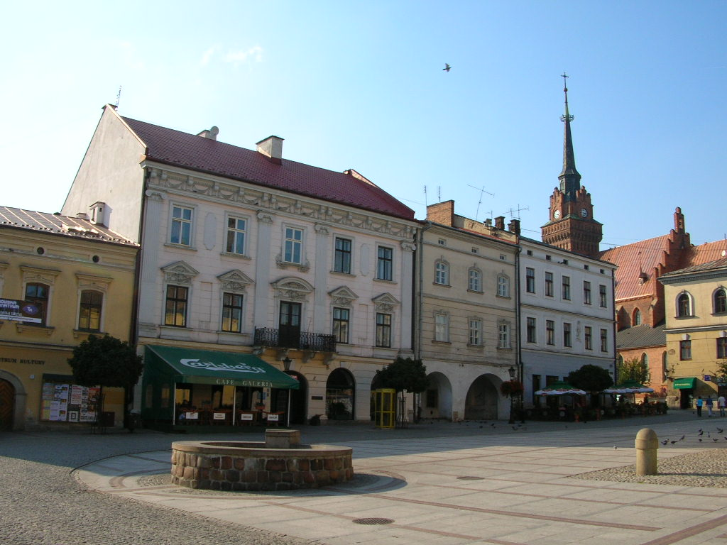 Tarnów - Rynek w tle katedra Autor : Bartek Wawraszko (Bast)